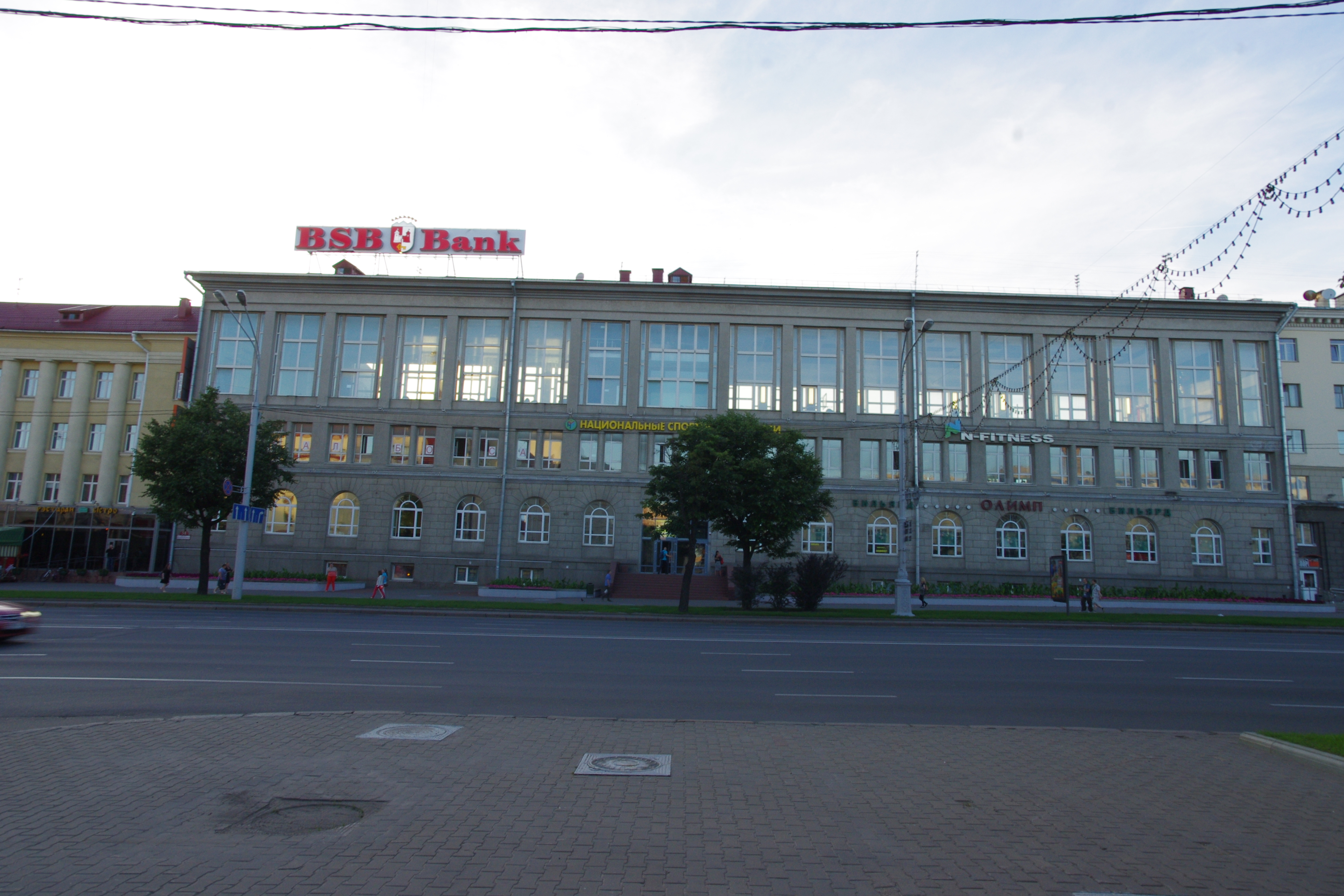 Minsk, Belarus